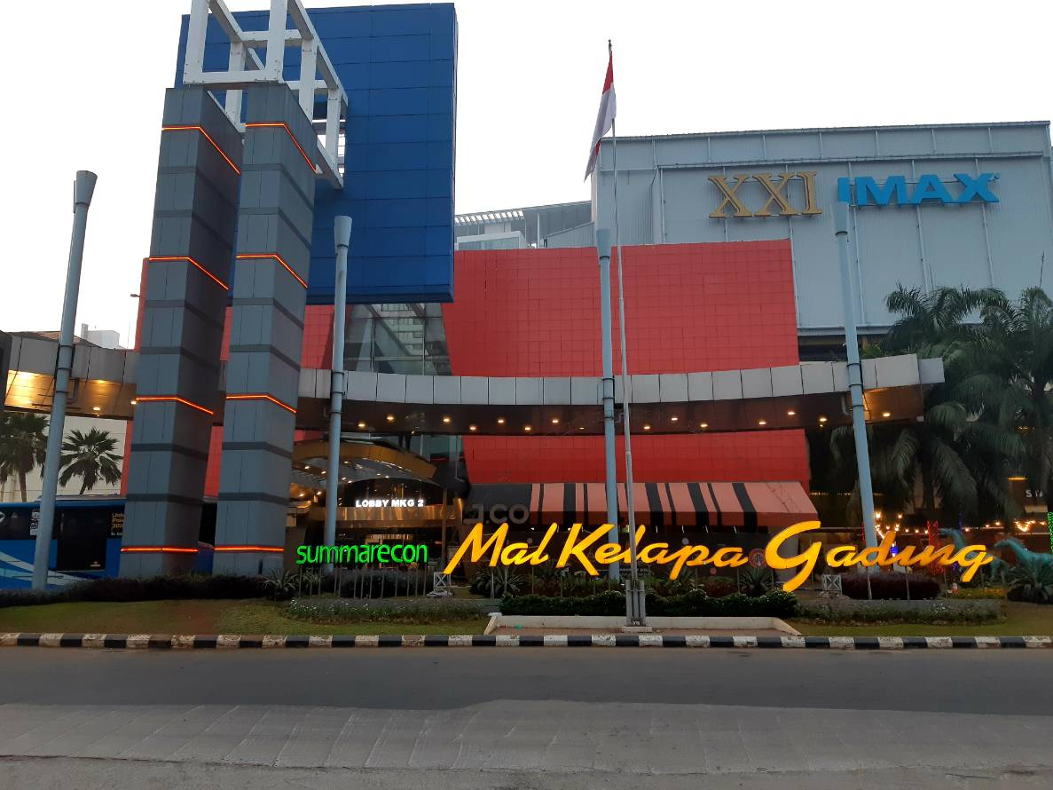 Tampak luar Mall Kelapa Gading 2